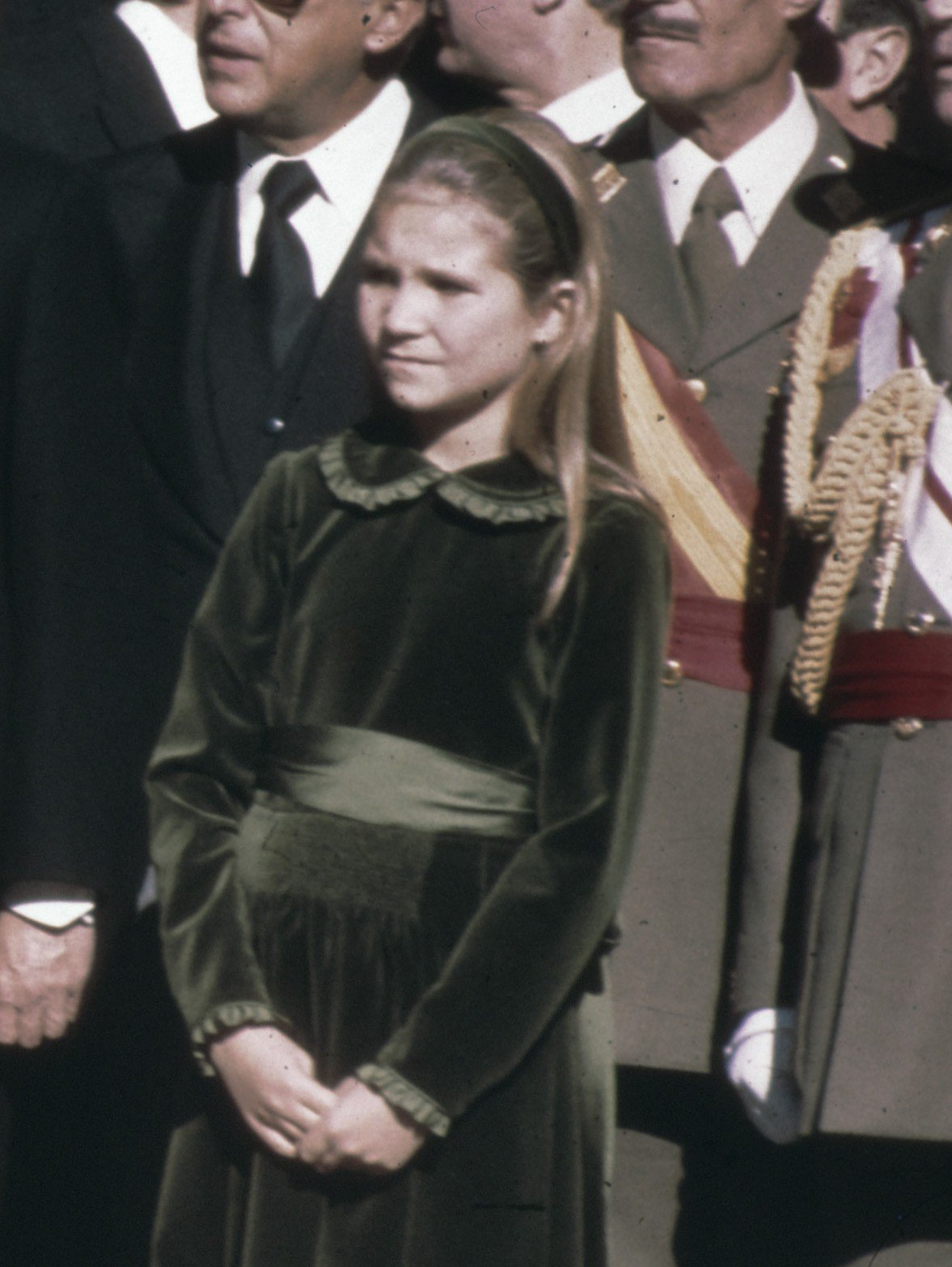 Collectie / Archief : Fotocollectie Anefo Reportage / Serie : [ onbekend ] Beschrijving : De proclamatie en beëdiging van Prins Juan Carlos tot Koning van Spanje tijdens een speciale zitting van de Cortes, het Spaanse parlement, op 22 november 1975. Juan Carlos vertrekt met zijn vrouw en kinderen na afloop van de plechtigheid. Datum : 22 november 1975 Trefwoorden : generaals Persoonsnaam : Franco, Juan Carlos, prins van Spanje Fotograaf : [onbekend] Auteursrechthebbende : Nationaal Archief Materiaalsoort : Dia (kleur) Nummer archiefinventaris : bekijk toegang 2.24.01.07 Bestanddeelnummer : 254-9764